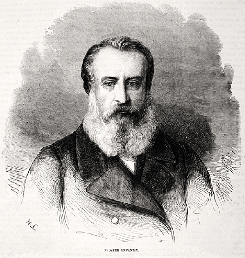 portrait de Barthélemy Prosper Enfantin (1796-1864)